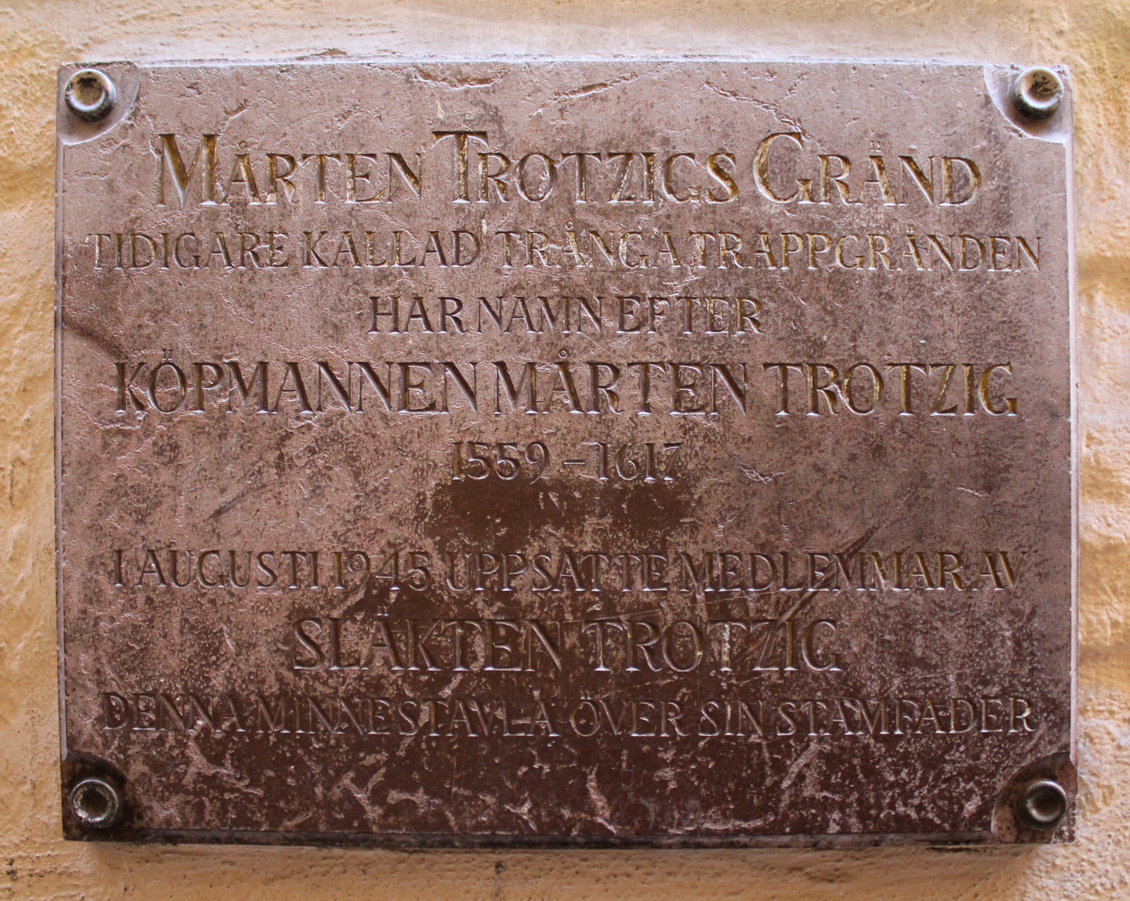 Minnesplakett över Mårten Trotzig i Mårten Trotzigs gränd, Gamla stan.